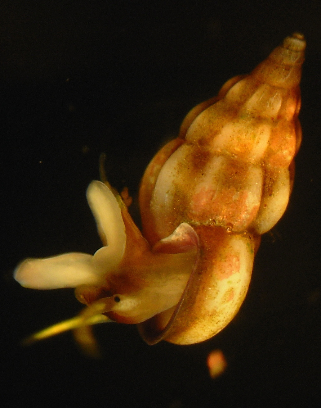 Rissoa guerini. Vue de la coquille avec varice, du côté droit du corps (pied, tête et tentacules).